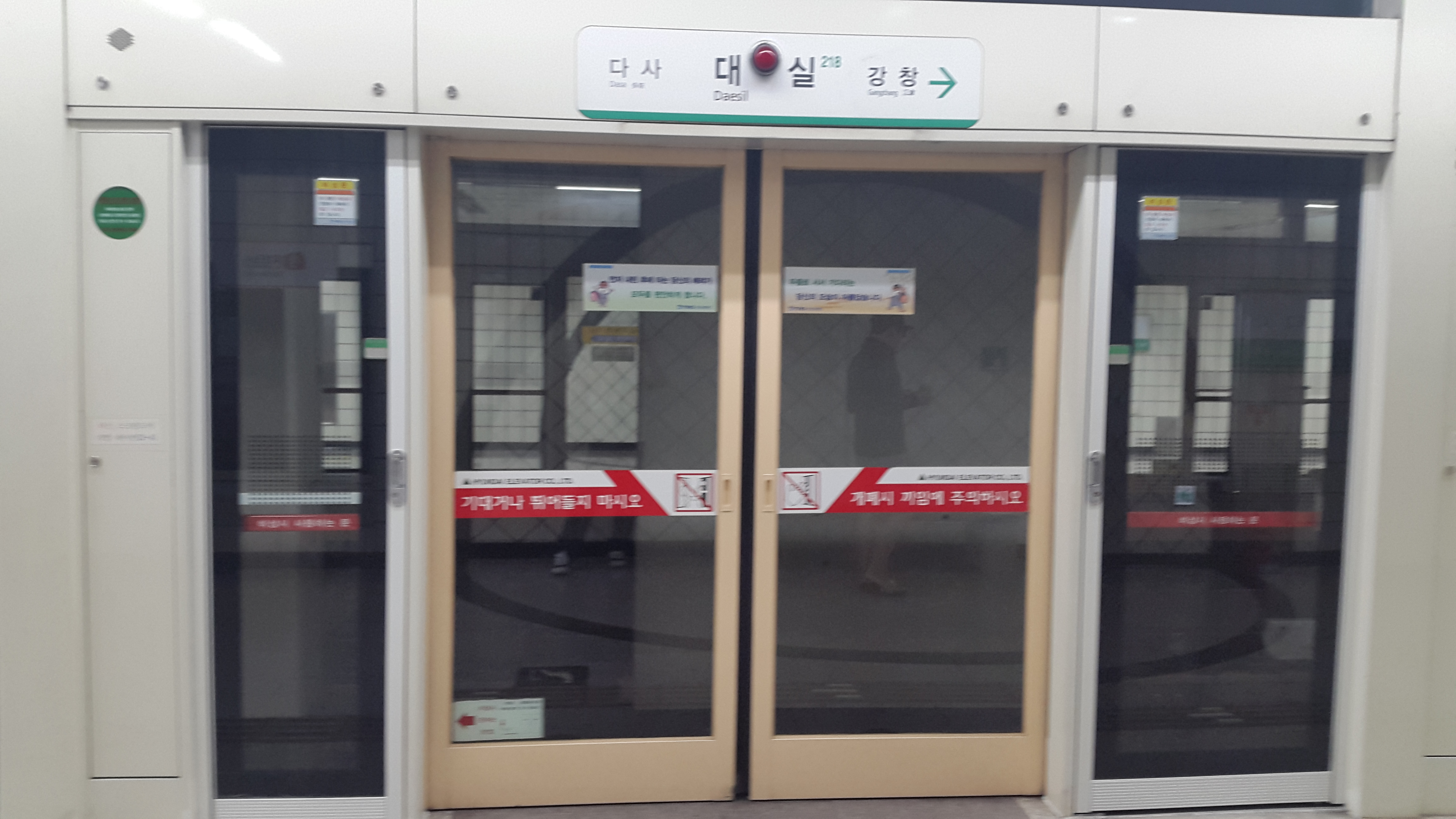 대실역 스크린도어